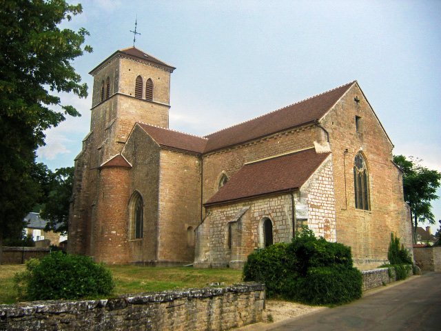 église de Gevrey_Chambertin, Bourgogne, France.